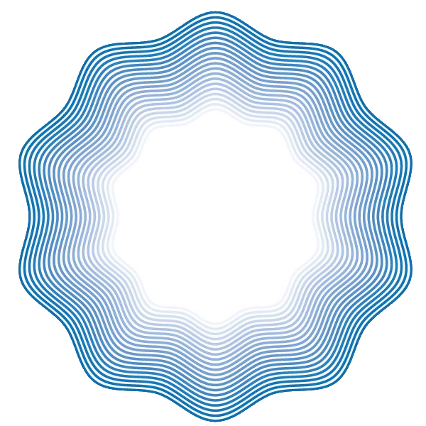 Logotipo oficial del Bicentenario de la Independencia de la República Argentina